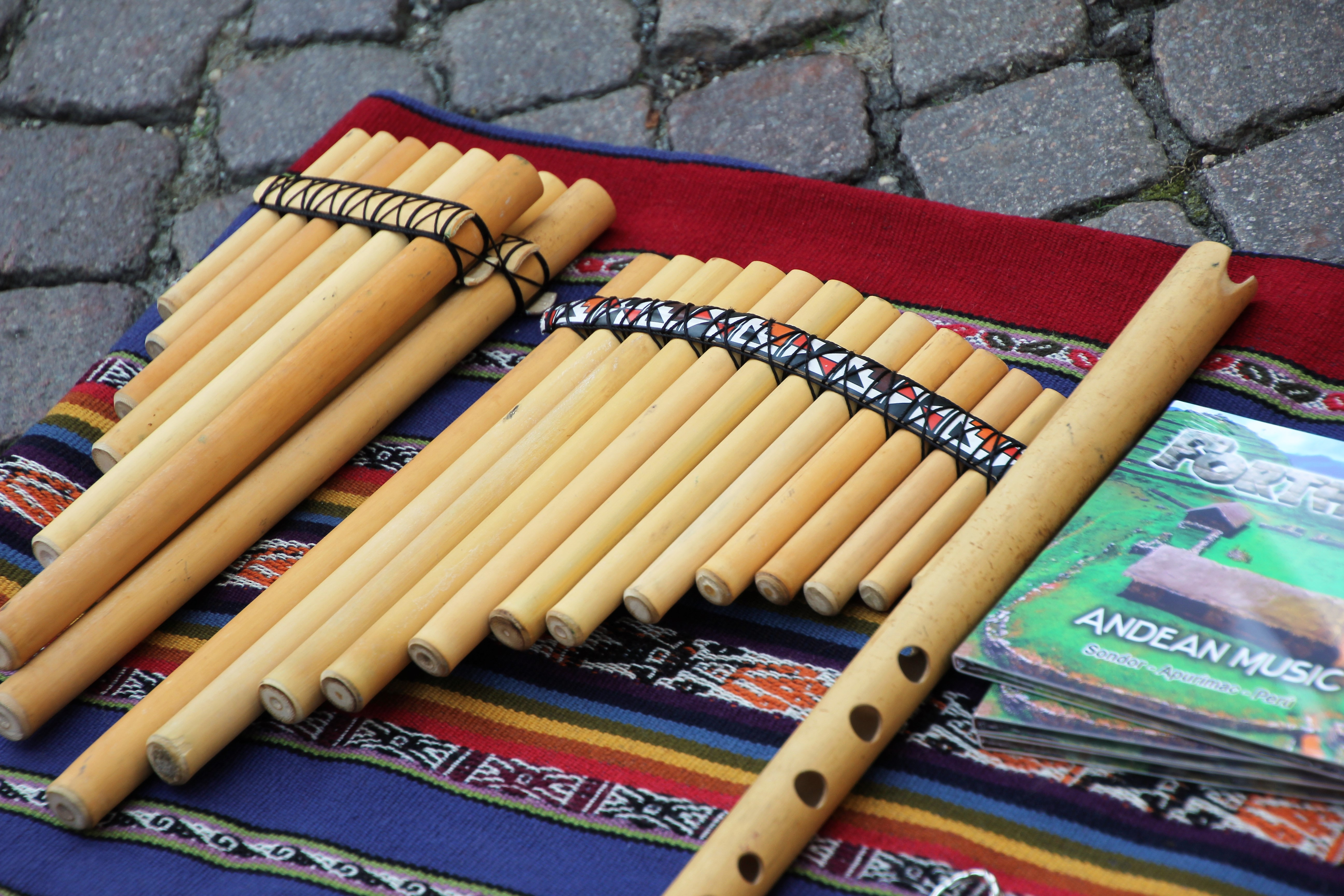 Strumento tipico sudamericano